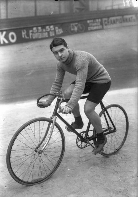 Comès, cycliste sur piste